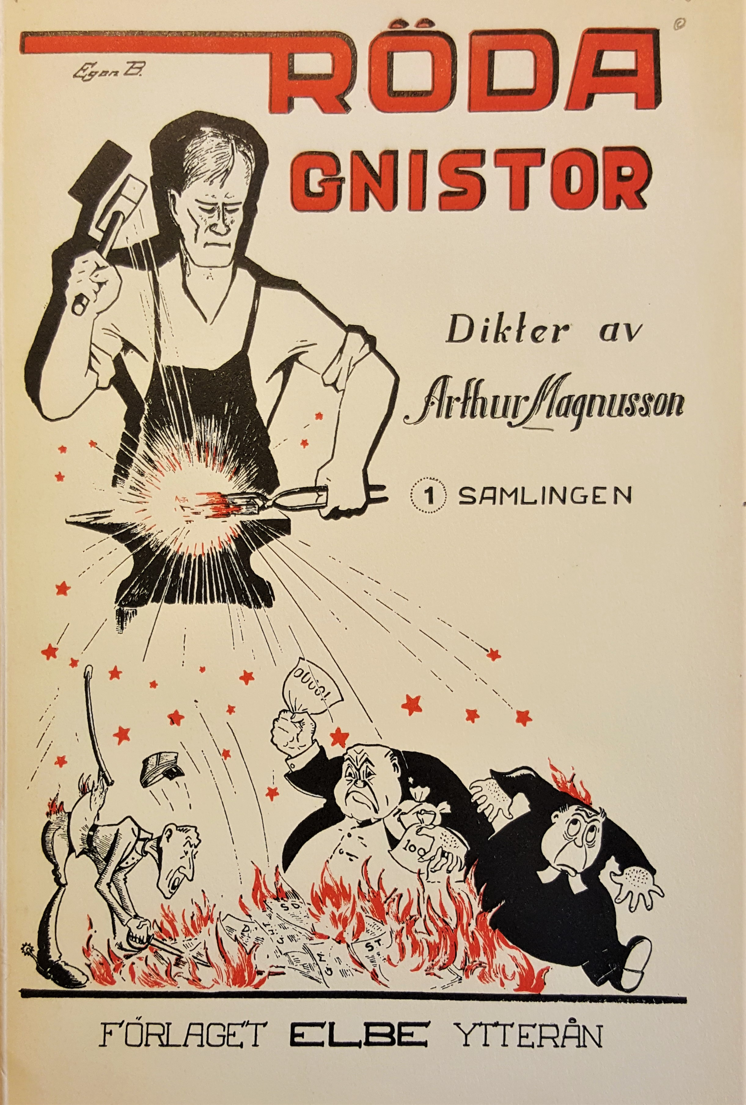 Titelsidan till Arthur Magnussons diktsamling Röda Gnistor